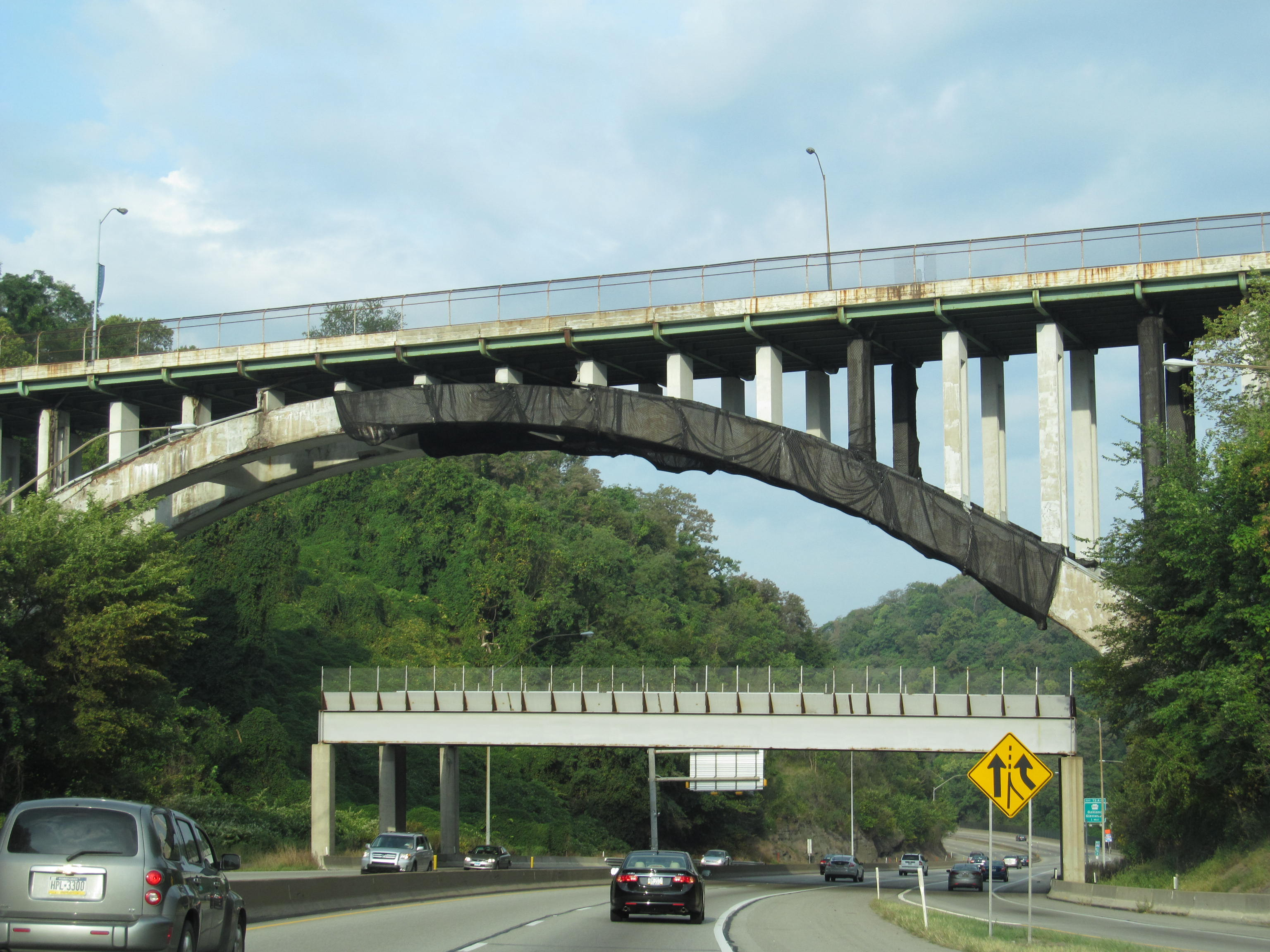 Interstate 376 - Pennsylvania